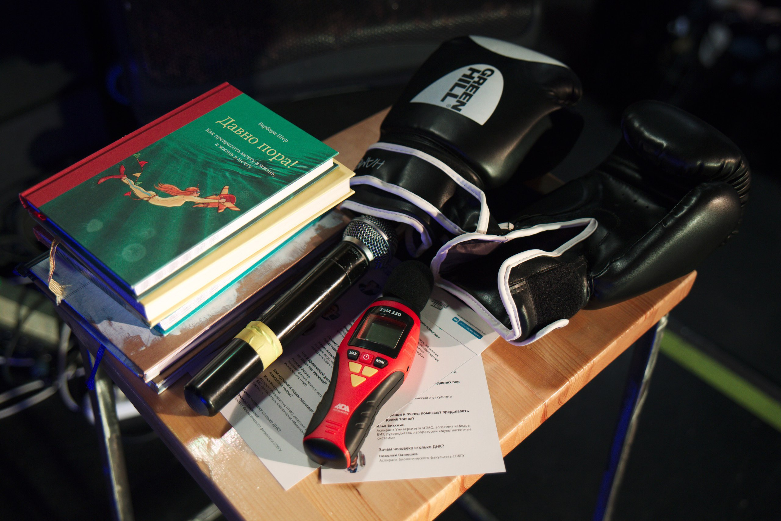 Science Slam Петербург, Зал ожидания. Перчатки победителя, шумомер, призовые книги и программа слэма